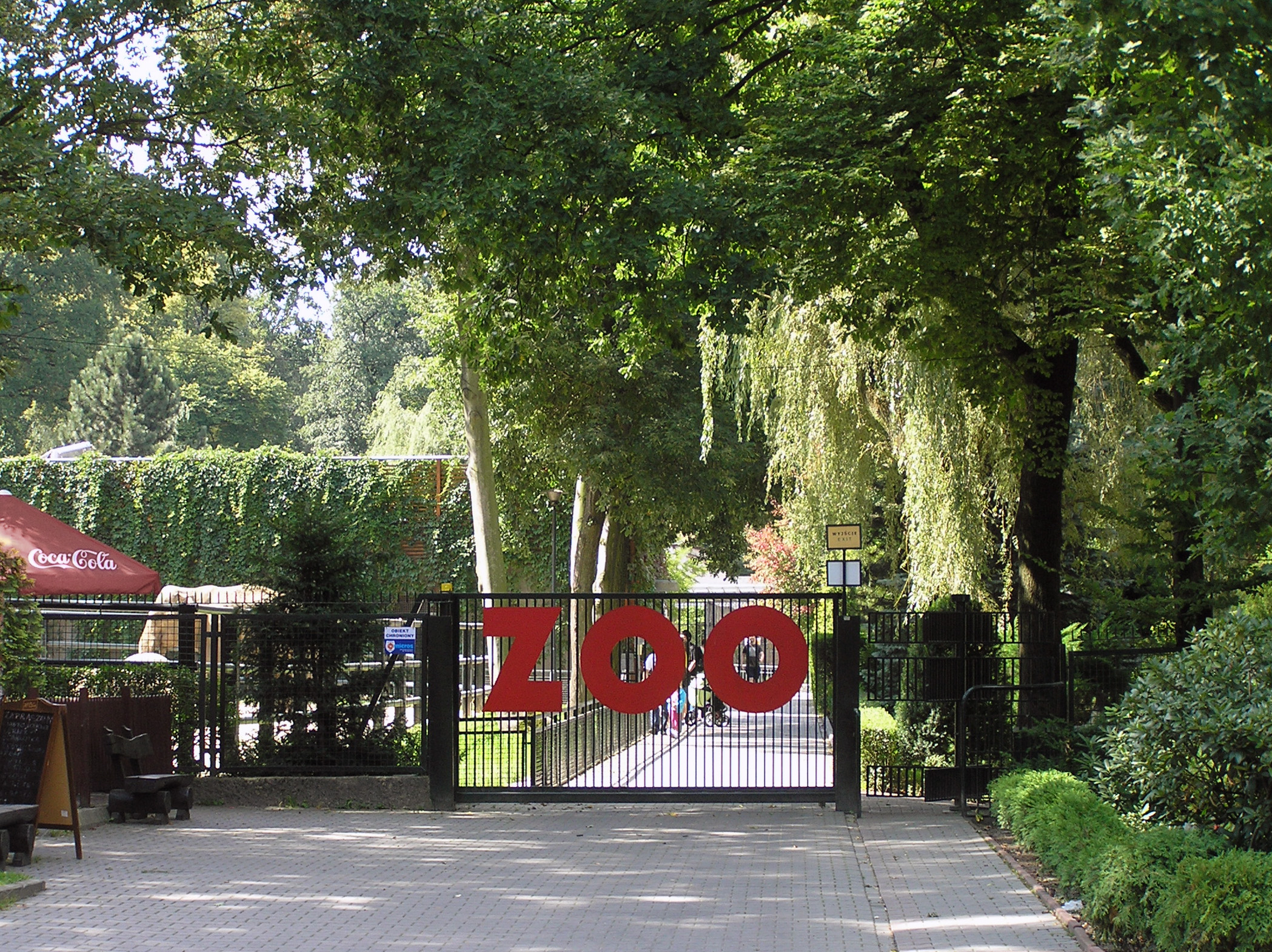 Wyjście z krakowskiego ogrodu zoologicznego